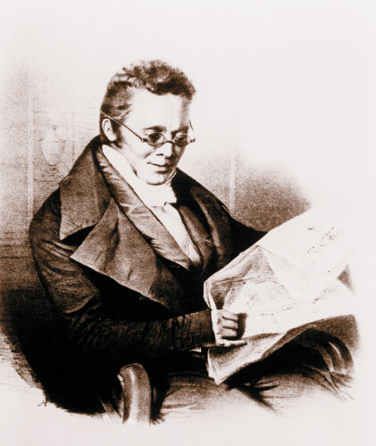 En 1791, un innovateur d'une exceptionnellement intelligence du nom de Jean-François Bautte a jeté les bases de la future entreprise. Il a été le premier horloger à employer le concept de fabrication de rassemblant toutes les étapes de construction d'une montre sous le toit tous les corps de métiers de l’horlogerie de l’époque, ce qui est à l'origine de l'industrie horlogère de luxe, et qui, deviendra par la suite la fierté de Genève. Très respecté par ses illustres collègues, Bautte a été réputé pour son humanisme, son finesse, et ses idées innovantes